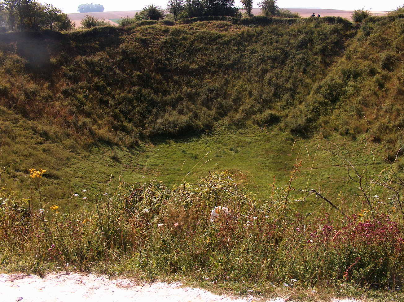 de krater bij La Boisselle, ten NW van Albert. 100 meter in doorsnede en 30 meter diep. Hier werd op 1 juli een mijn van 60.000 pond tot ontploffing gebracht foto door mij, G van den Bor, gemaakt in juli 2005. Publiek domein, en uitdrukkelijke toestemming voor gebruik op Wikipedia.